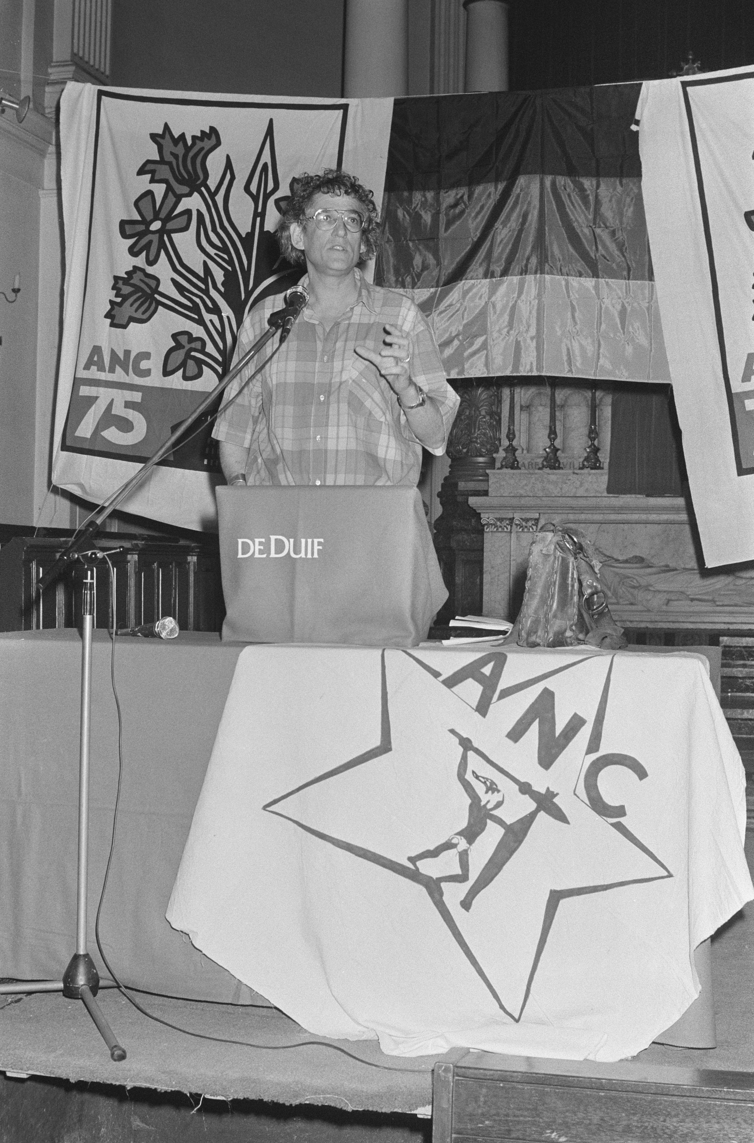 Welkomstmanifestatie Klaas de Jonge in De Duif te Amsterdam; toespraak Klaas de Jonge Datum 12 september 1987